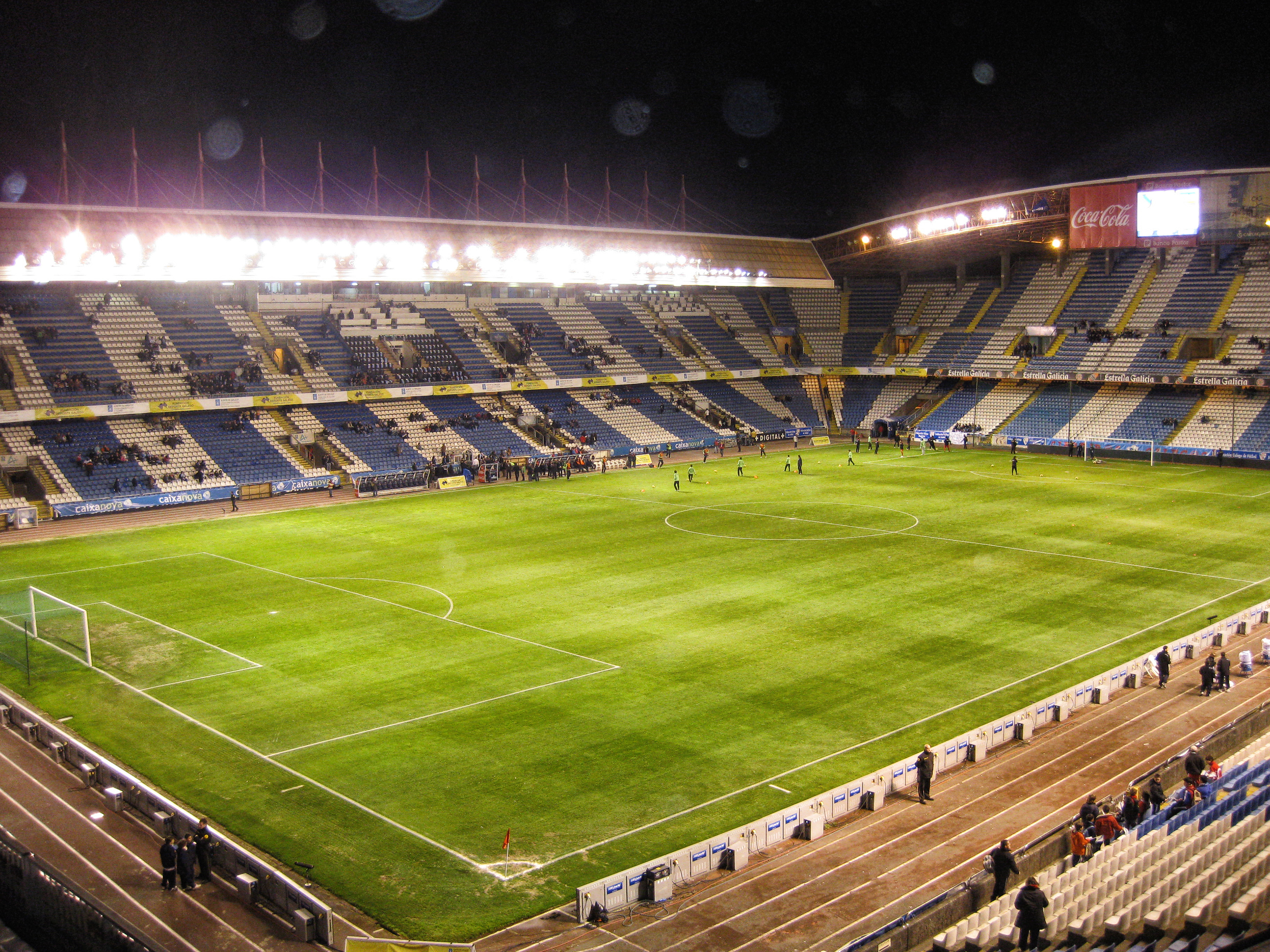 Estadio de Riazor, na Coruña.